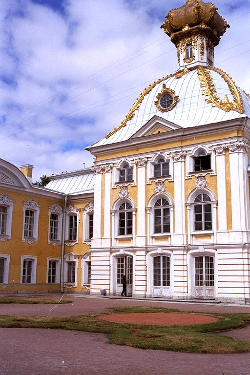 De Peterhof, Summerpalais vun den Tsaren